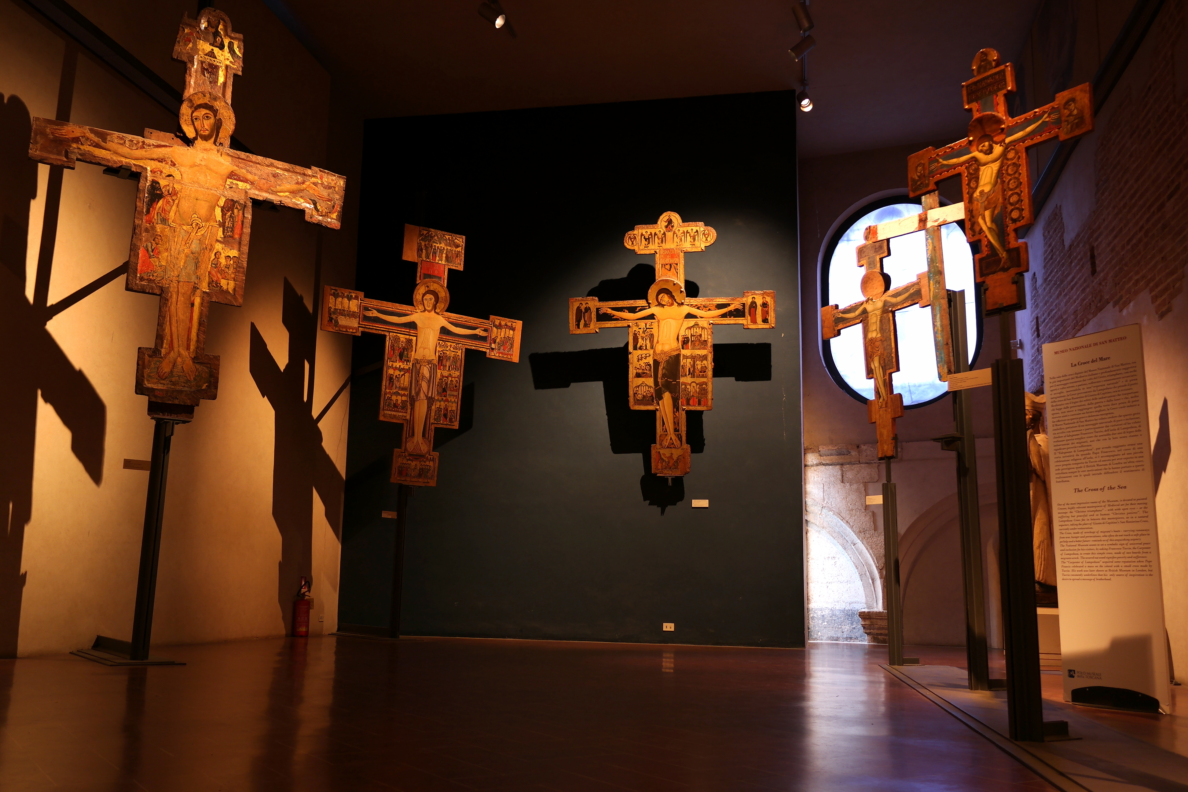 Sala delle Croci dipinte, nel Museo Nazionale di San Matteo a Pisa